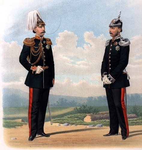 Генерал-адъютант и Лейб-медик IV класса. (праздничная форма) 24 марта 1873.